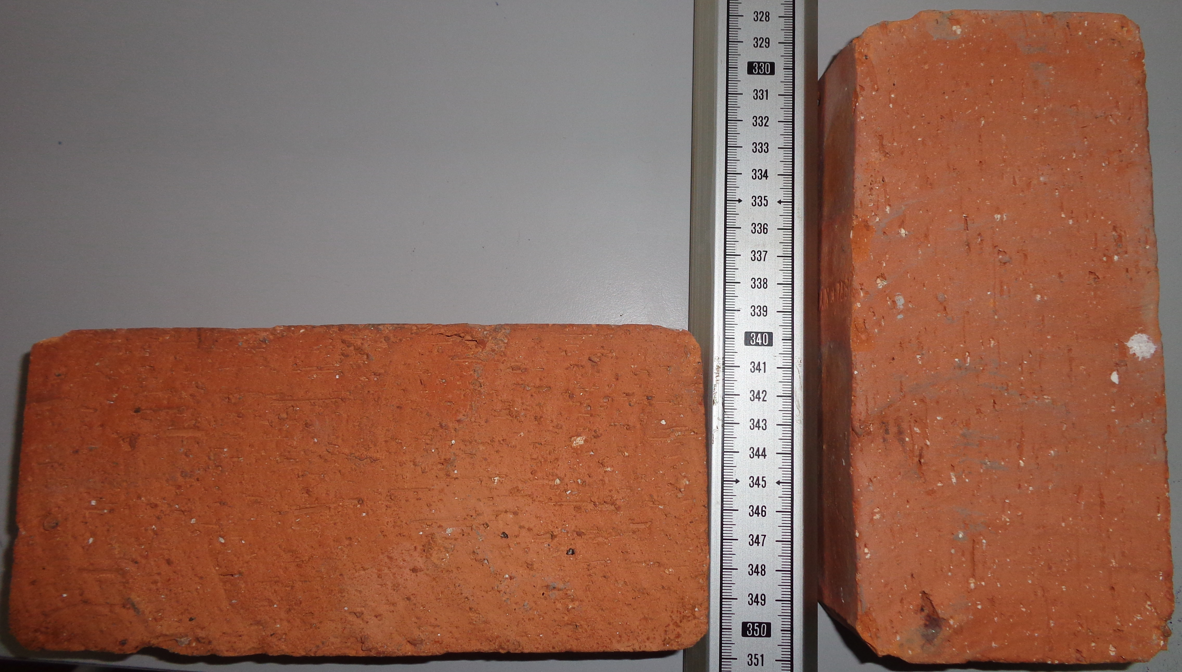 Kích thước nằm của viên gạch chỉ đặc (chiều dài và chiều rộng)